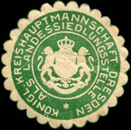 Siegelmarke, Titel/Herausgeber: Königliche Kreishauptmannschaft Dresden als Landessiedlungsstelle, Details: grün, weiß, geprägt, Ort: Dresden, Größe: 4 cm